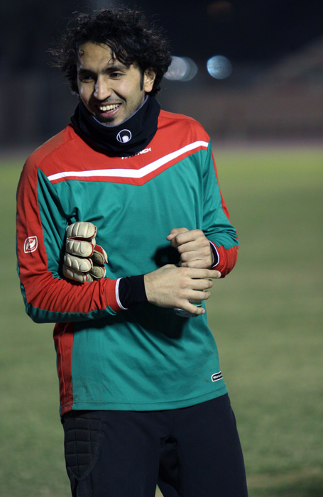 صورة للكابتن محمد خوجة قبل سنة من تصويري اخوكم ياسر باصرة